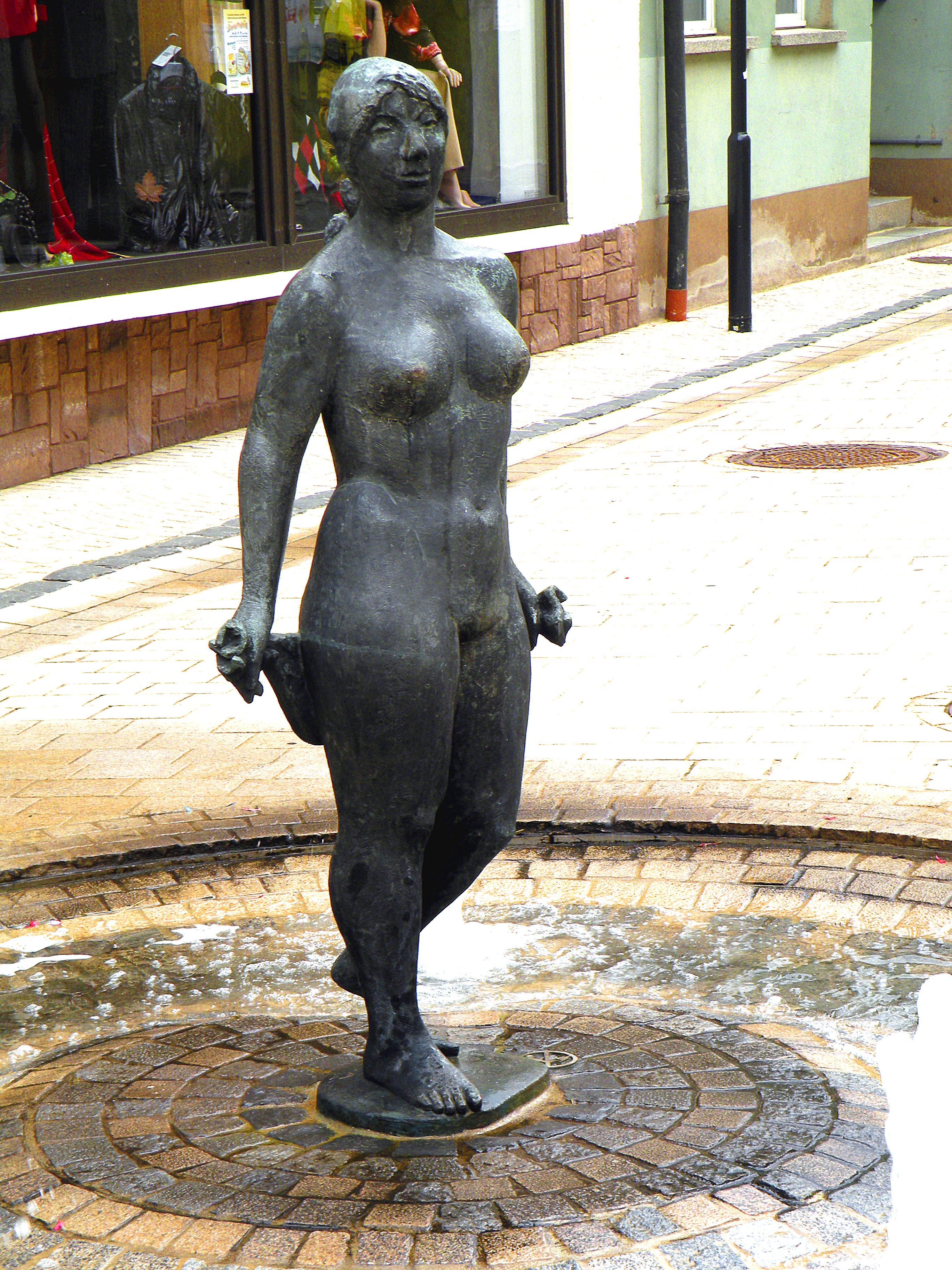 Bad Frankenhausen. Städtische Symbolik